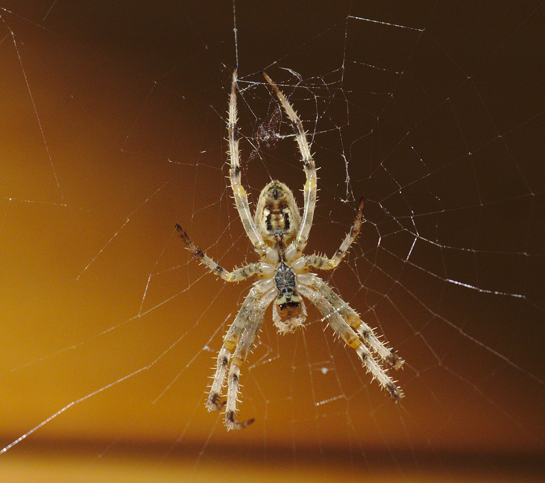 Deitsch: Gartenkreuzspinne Bauchansicht